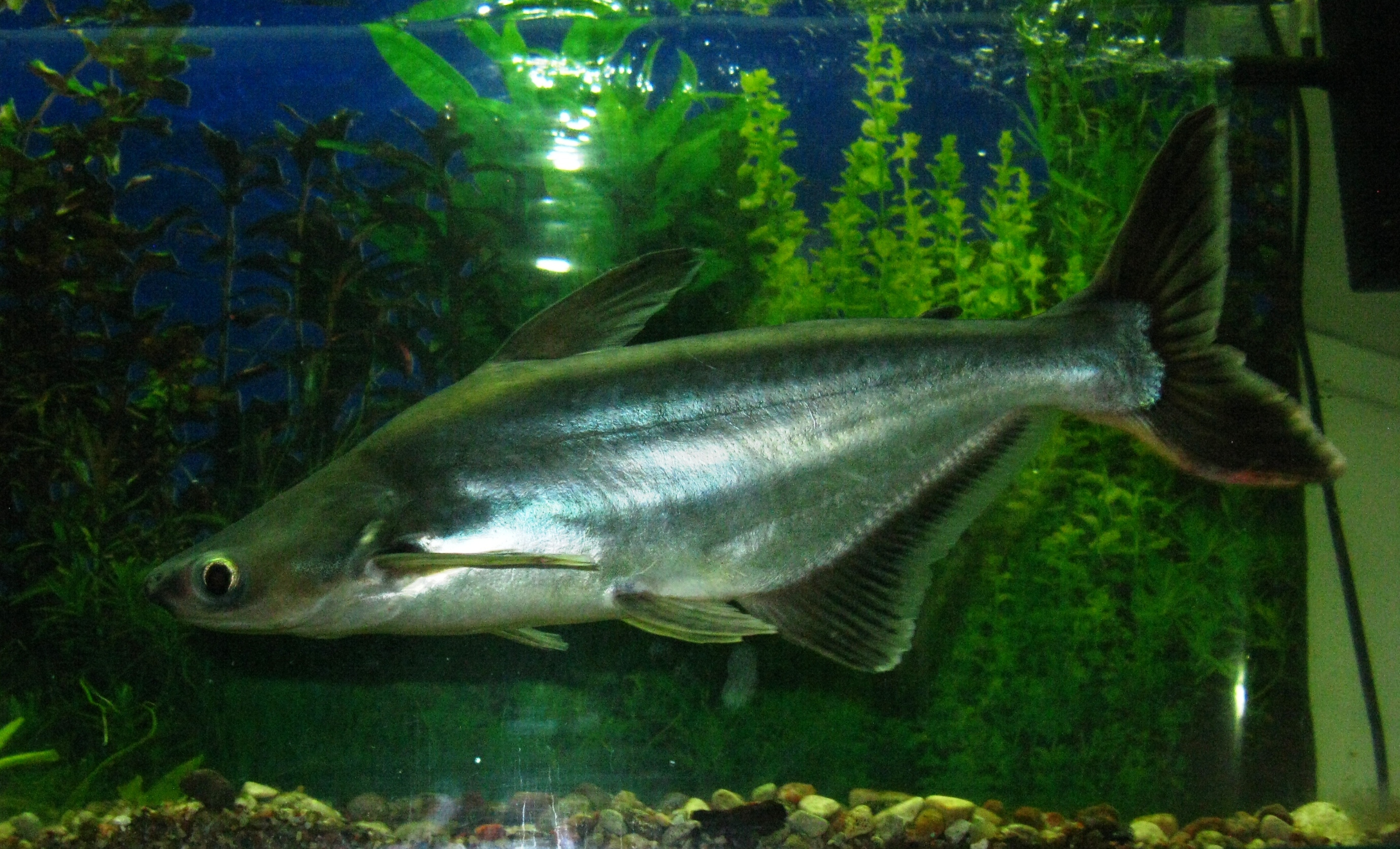 Акулий сом, или пангасиус (Pangasius hypophthalmus) в зоопарке города Гродно, Беларусь.